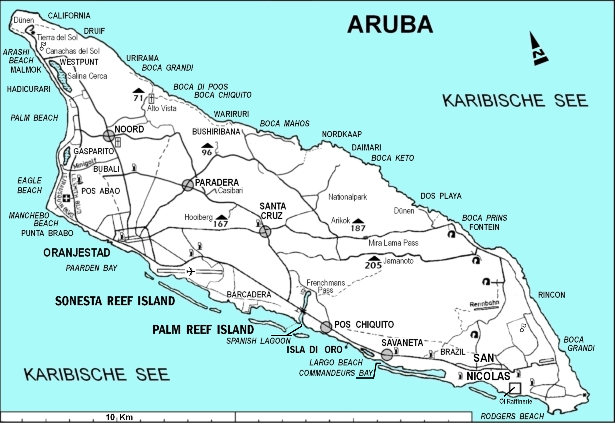 Karte von Aruba